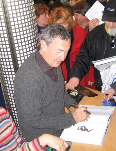 Nick Mason bei der Präsentation seiner Pink Floyd-Biografie "Inside Out" im SWR-Funkhaus Mainz, 19. März 2006